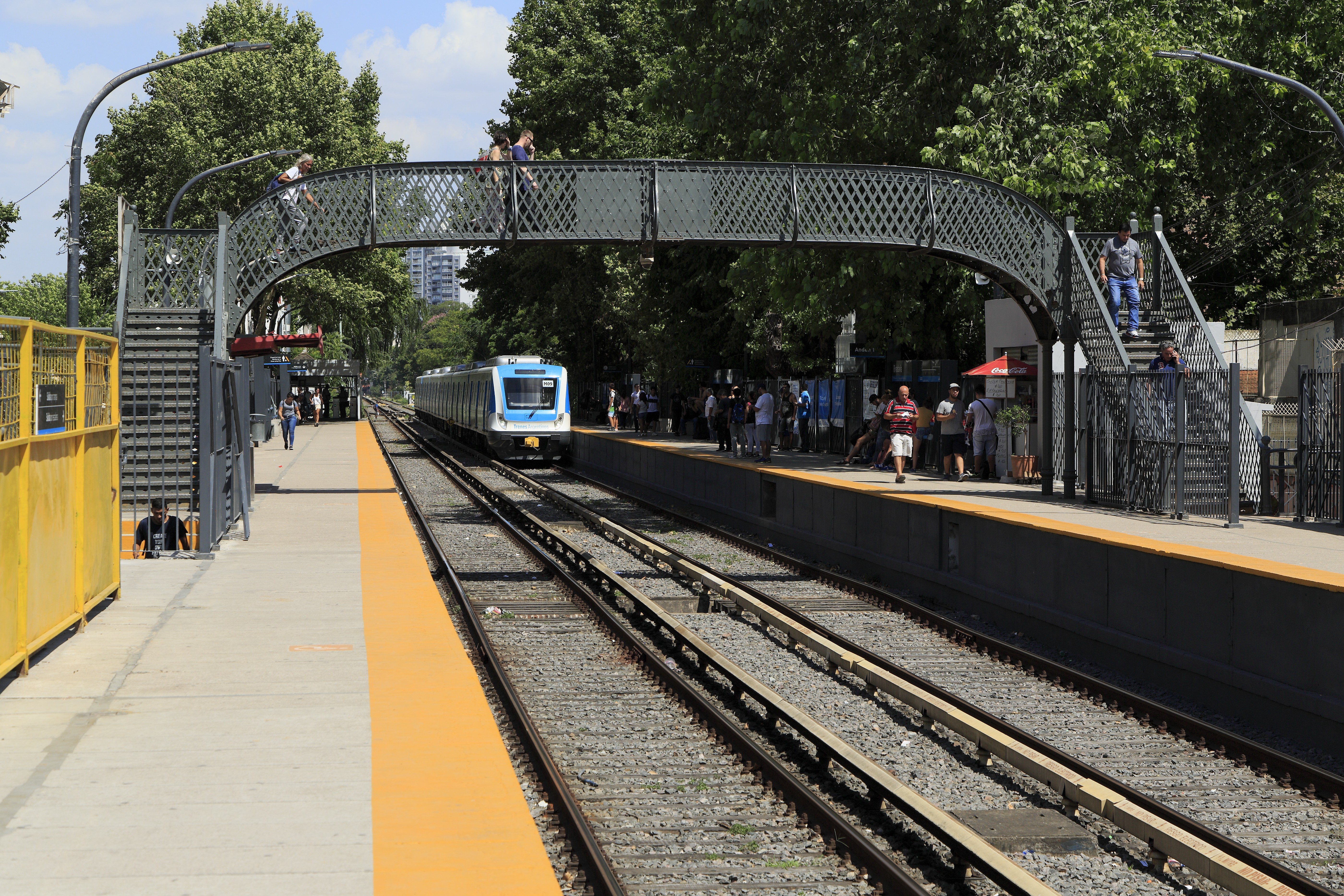 Haltepunkt mit einer typisch britischen Fußgängerbrücke, seit der Bahnsteiganhebung für stufenlose Einstiege dient auch diese nur noch dem allgemeinen Fußgängerverkehr außerhalb der Sperrenbereiche. Zum Aufnahmezeitpunkt enden die Züge von Tigre wegen der Bauarbeiten für die Hochlegung der Strecke am stadtseitigen Endpunkt allerdings in Nuñez. Wer nach Retiro und damit in die Innenstadt oder in andere Viertel will, muss hier absteigen, mit einem Pendelbus oder zu Fuß zum Hp Aristobulo del Valle an der meterspuigren Linea Belgrano Norte kommen und von dort nach Retiro Belgrano weiterfahren. Hier wirkt sich die einstige Konkurrenzsituation der ursprünglichen Betreiber aus, an keiner der sechs Streckenkreuzungen oder -trennungen im Norden von Buenos Aires gab es jemals echte Umsteigebahnhöfe.Im Hintergrund kommt ein S-Bahn-Zug von Nuñez, er fährt nach Tigre. Die Stromschienen sind hier noch nicht umgebaut, es sind noch immer die alten, asymmetrischen U-Stahlprofile. Der Oberbau ist zwar gelascht, er macht mit dem K-ähnlichen Unterlagsplatten, einer indirekten Schienenbefestigung und sauberer Bettung jedoch einen soliden und sorgfältig unterhaltenen Eindruck.